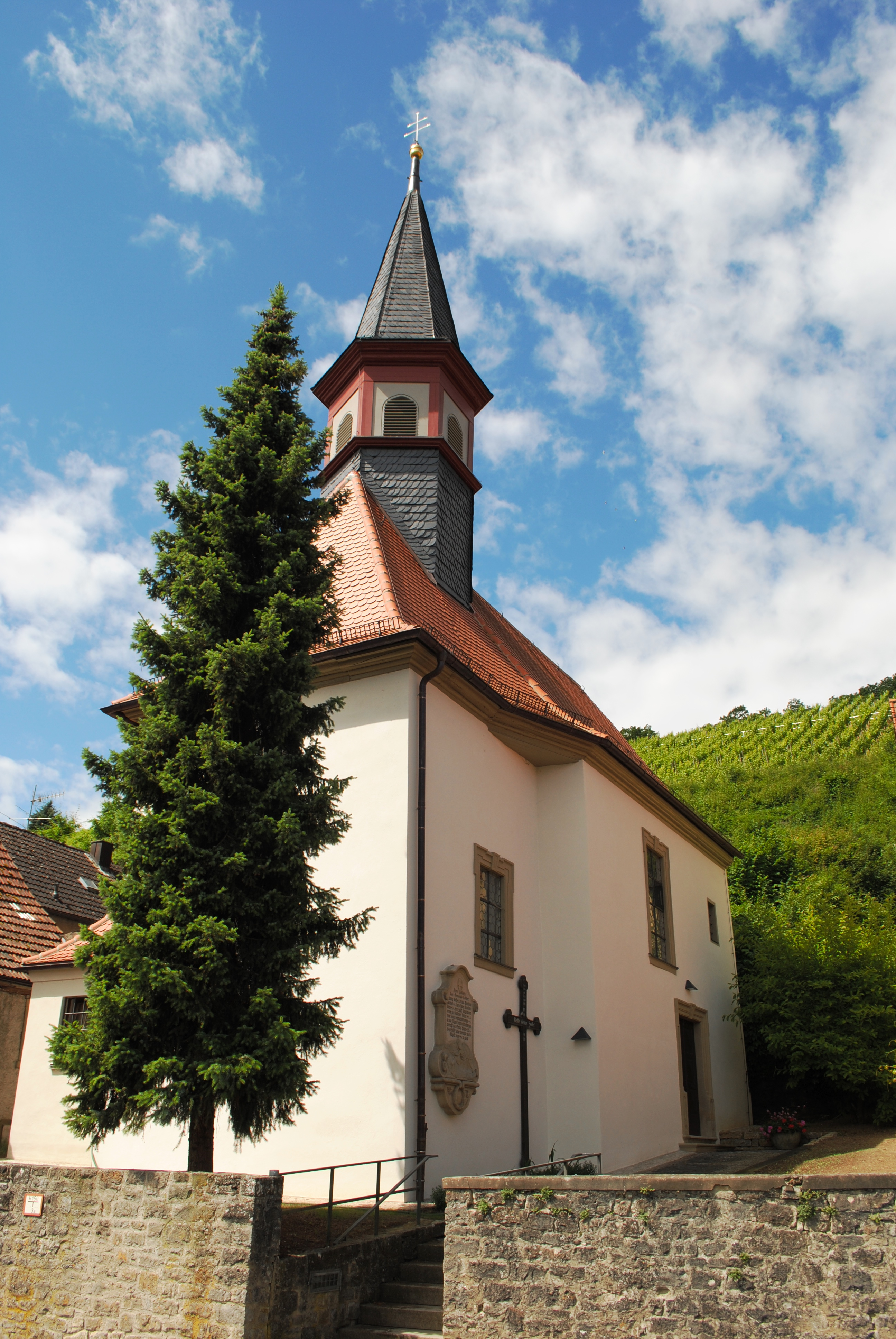 Kirche St. Andreas, Köhler, Volkach